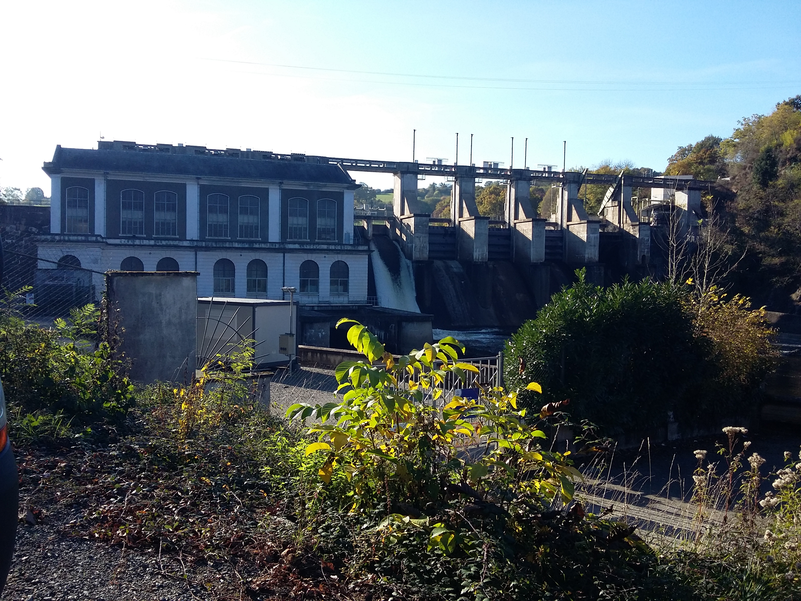 Barrage de La Roche-au-Moine (36) : Vue générale du barrage.